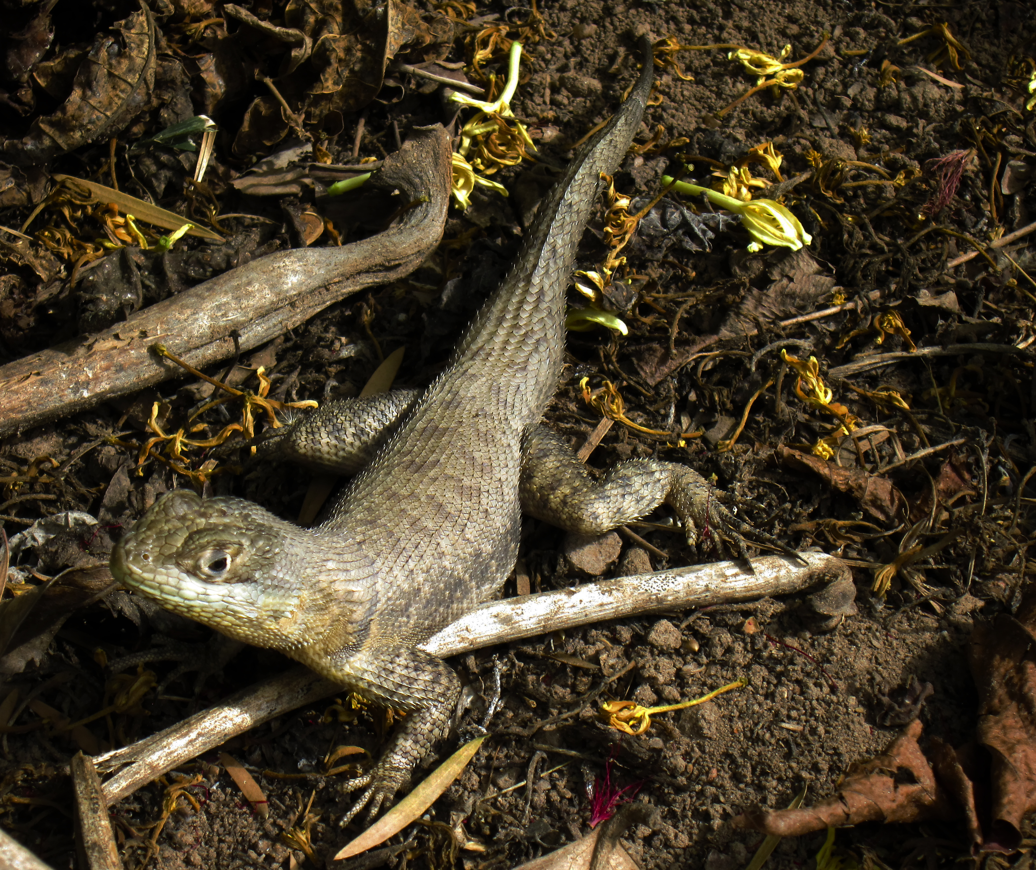 Calango marrom, muito comum na região norte de Minas Gerais